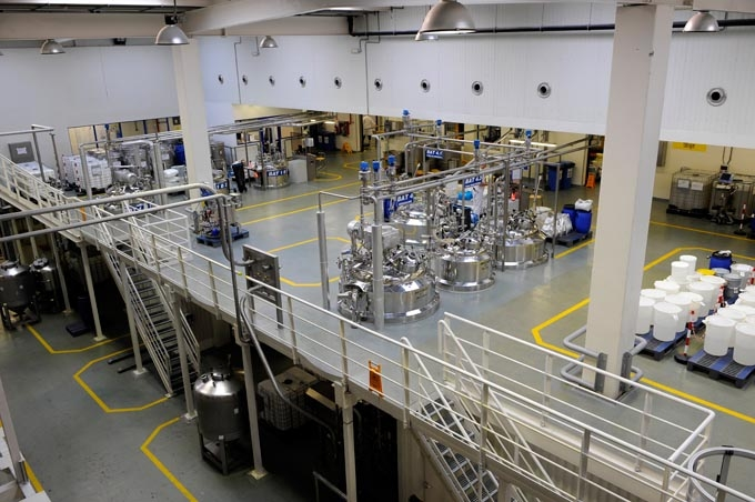 Naważąlnia w BMP Sp.z o.o.